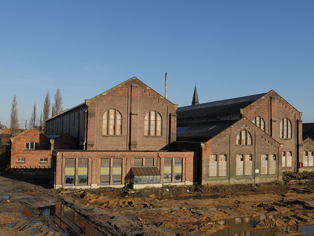 verlaten herstellingsloodsen op het terrein van het goederenstation Antwerpen-Dam